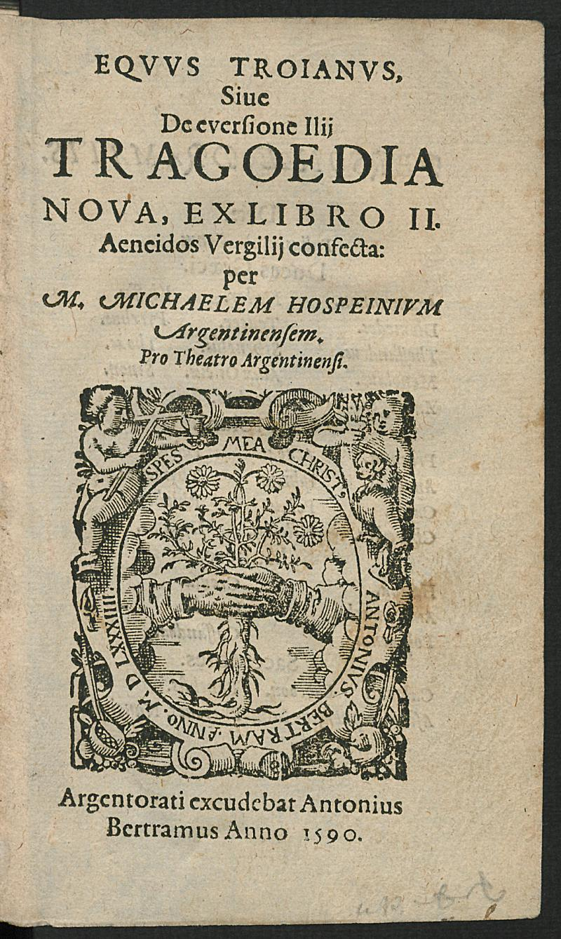 Titelblatt des Werkes Equus Troianus: Ein Drama von Michel Hospein (Michaelem Hospeinium), frei nach Texten aus dem zweiten Aeneisbuch von Vergil in Latein verfasst, in Straßburg 1590 von Anton Bertram (Antonius Bertramus) gedruckt und veröffentlicht.